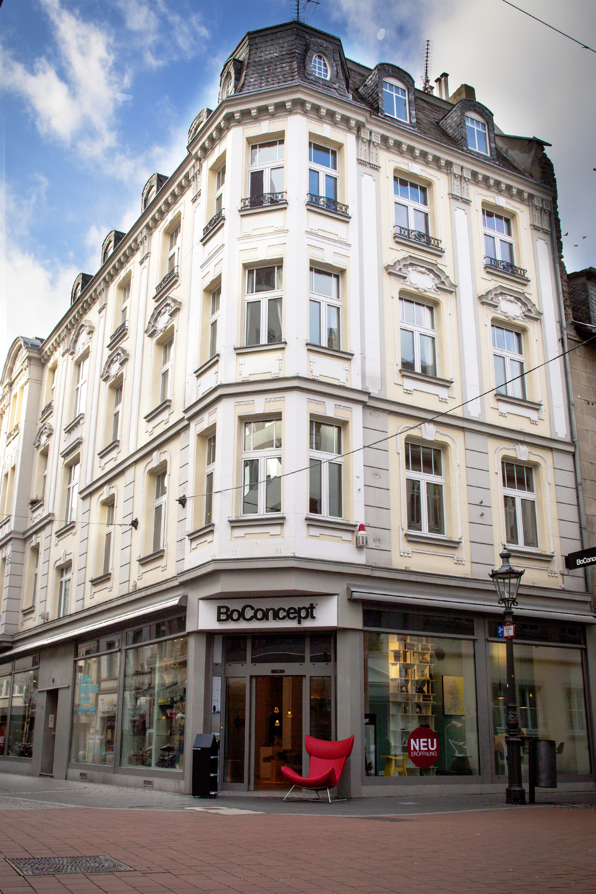 BoConcept Bonn mit Designklassiker Imola, Friedrichstraße 35 (Ecke Bonngasse)